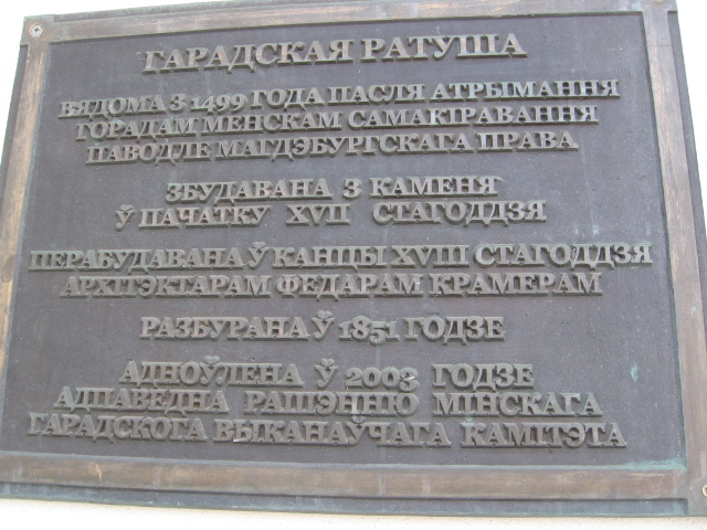 Доска на минской ратуше